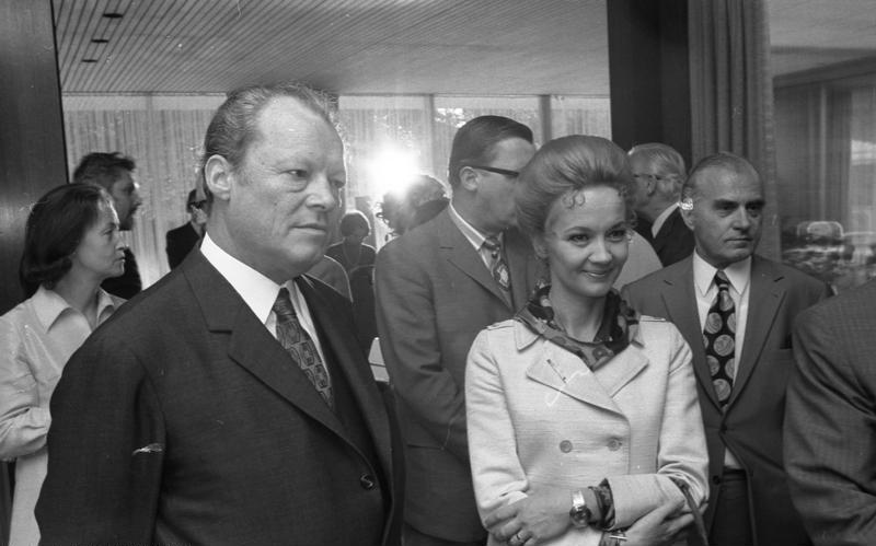 Bundeskanzler Willy Brandt empfängt Filmschauspieler